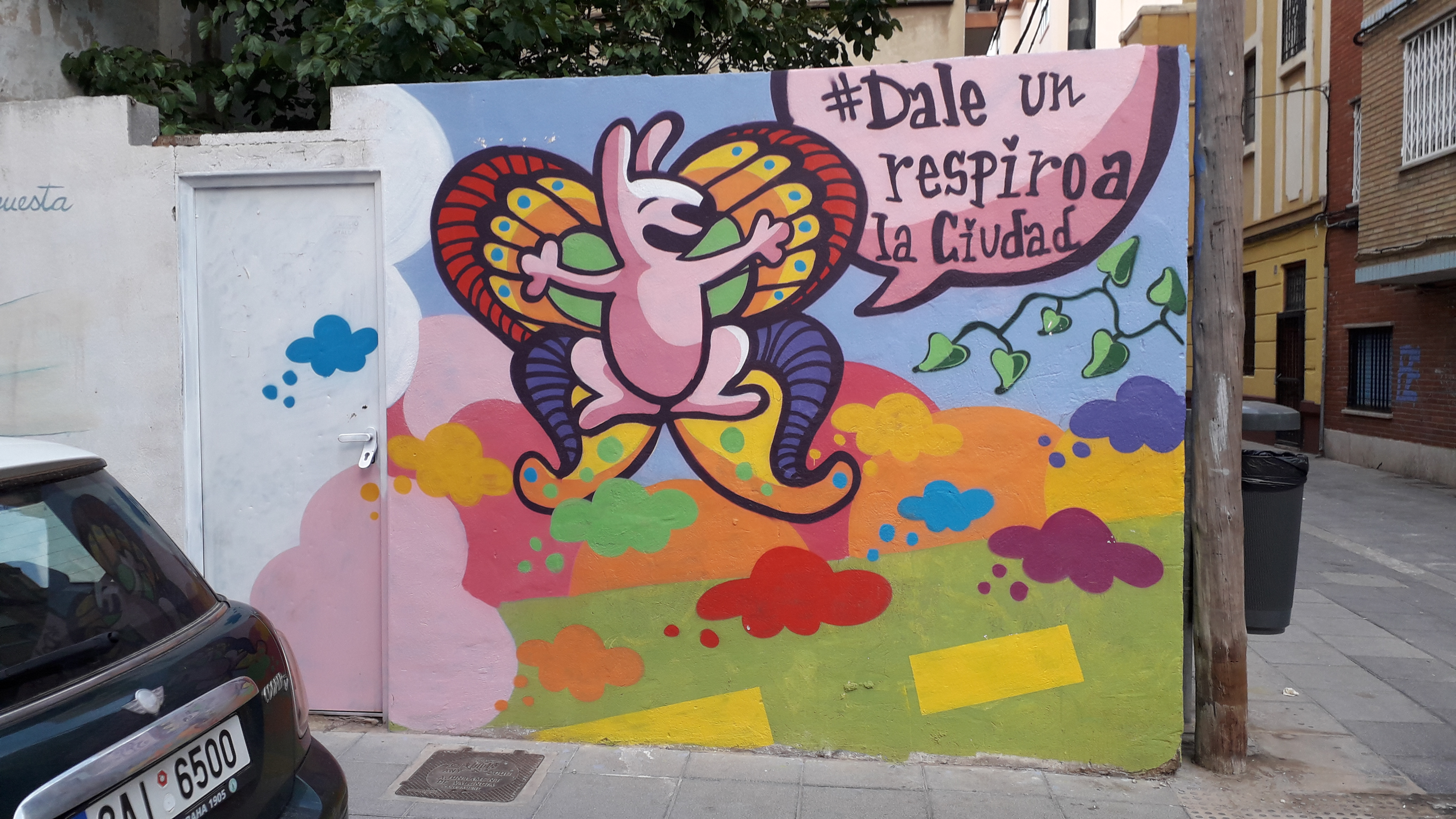 Peinture murale dans le quartier du Cañamelar (quartiers maritimes) de Valence